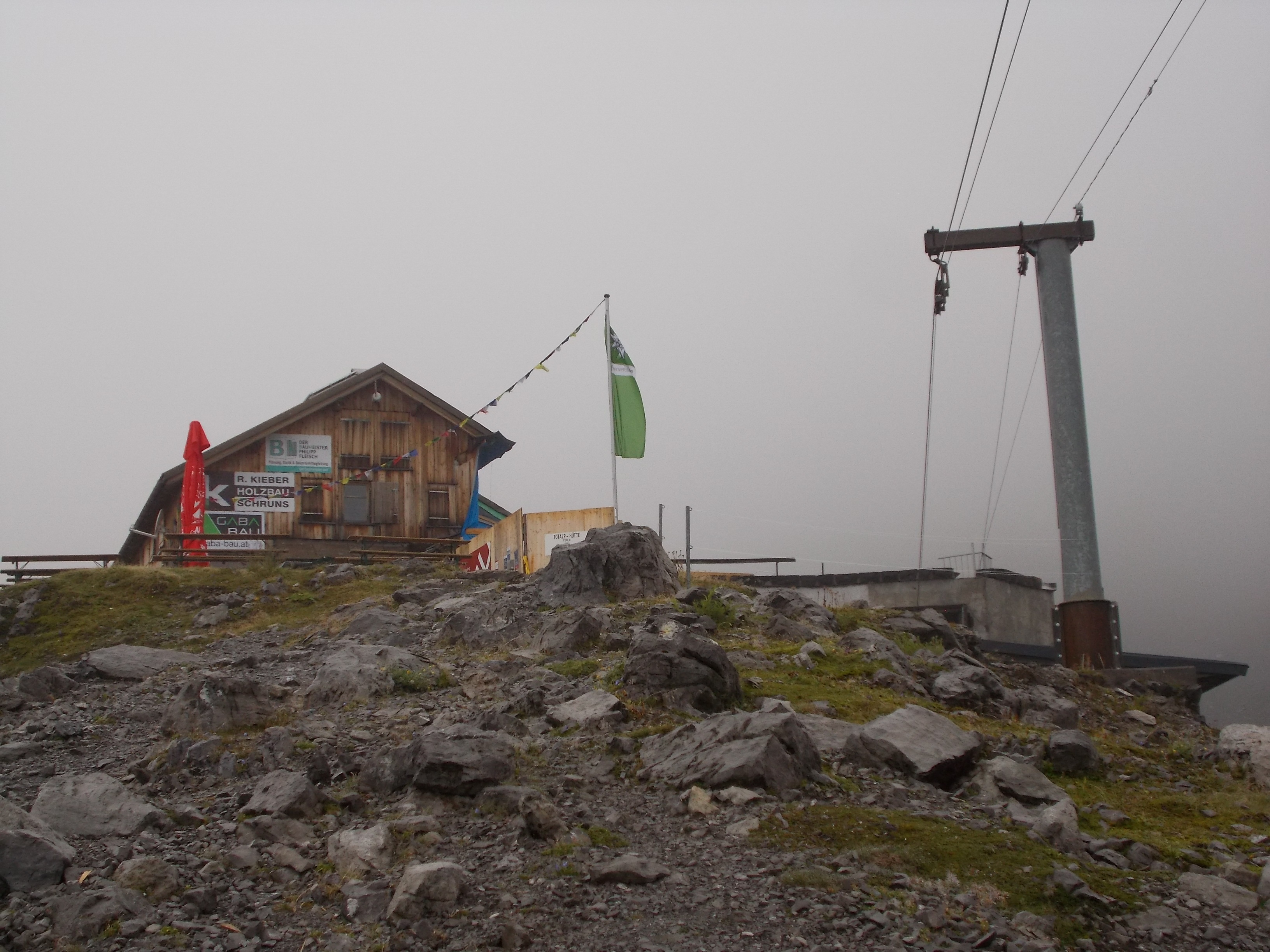 Totalphütte im September 2019 mit der reparierten Stütze der Materialseilbahn